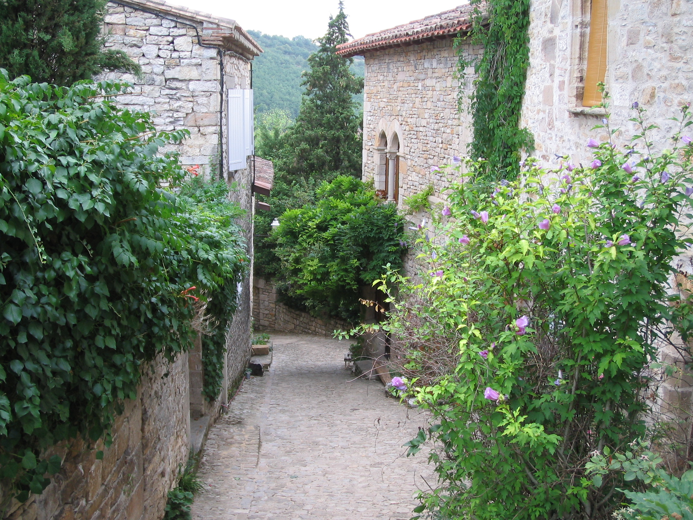 Bruniquel (Tarn-et-Garonne, France) : Haut de la rue principale au pied du château.